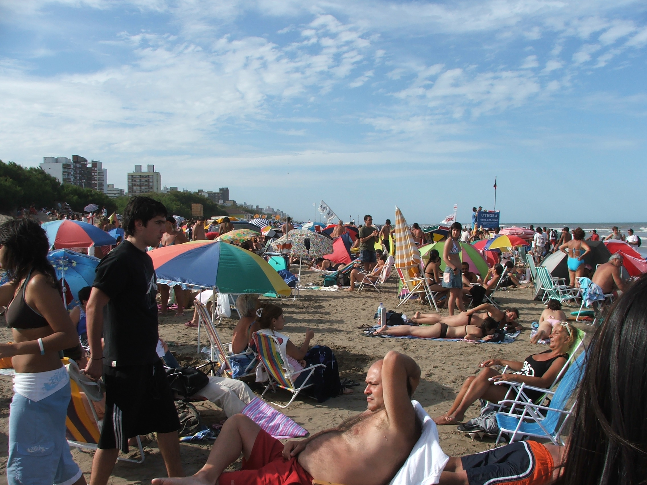 Beachgoers in San Bernardo del Tuyú, Argentina.